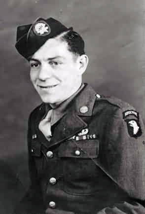 Eugene Roe during WWII.